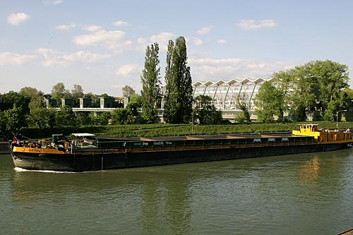 Flusskraftwerk Birsfelden mit Rheinschiff